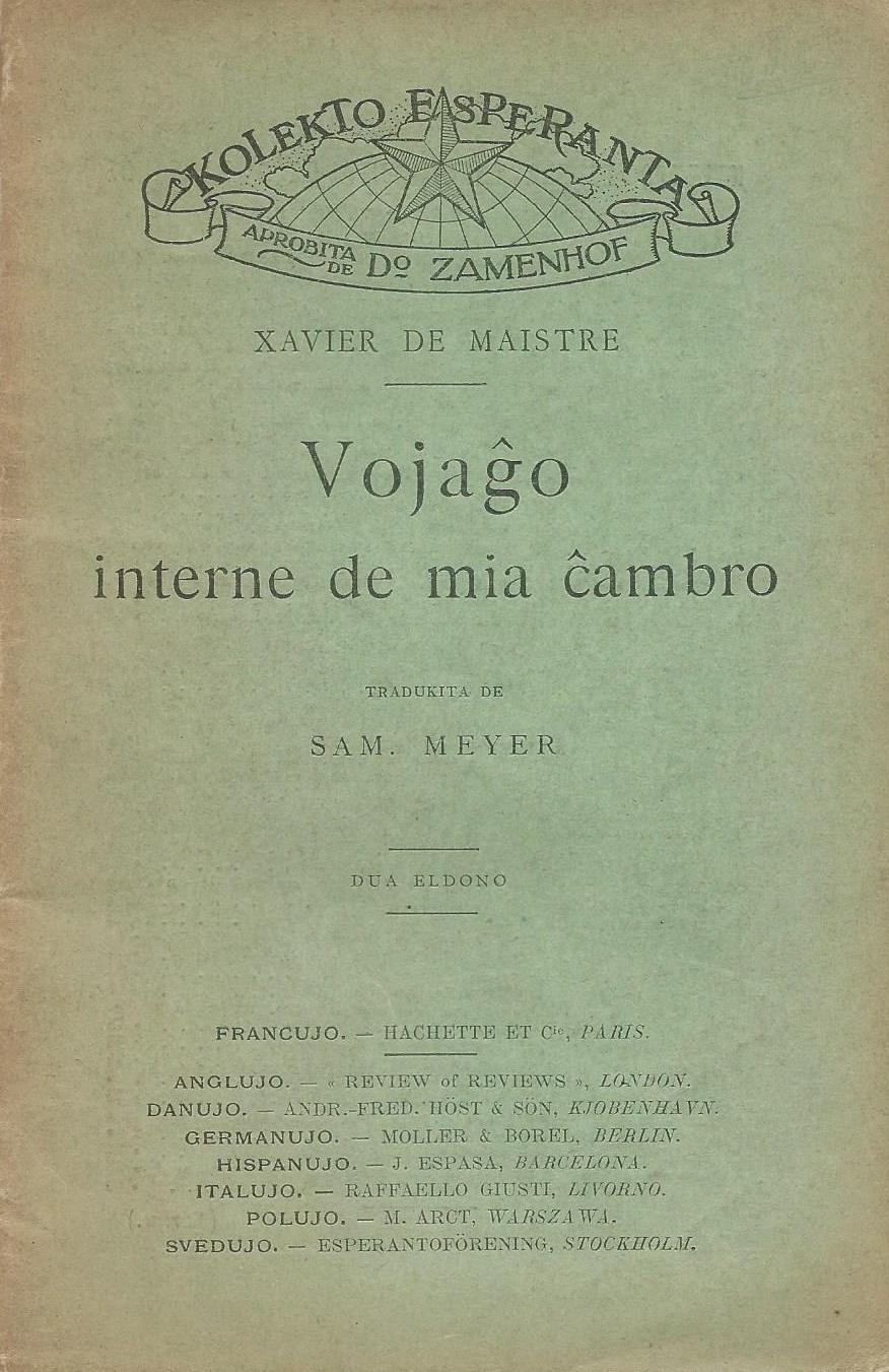 librokovrilo de "Vojaĝo Interne de Mia Ĉambro", 1906